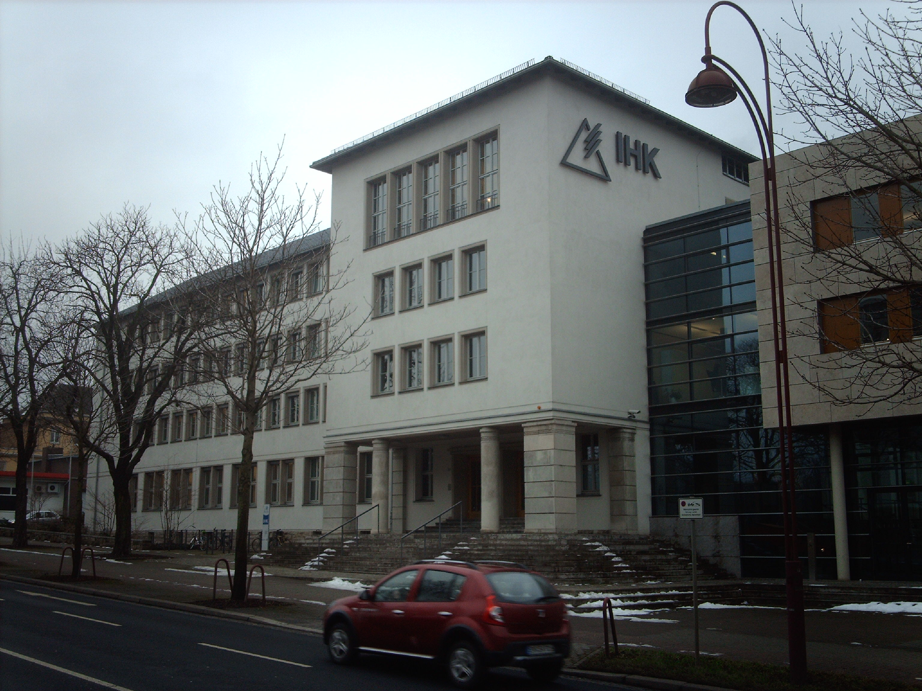 Haus der IHK in Erfurt (Arnstädter Straße)